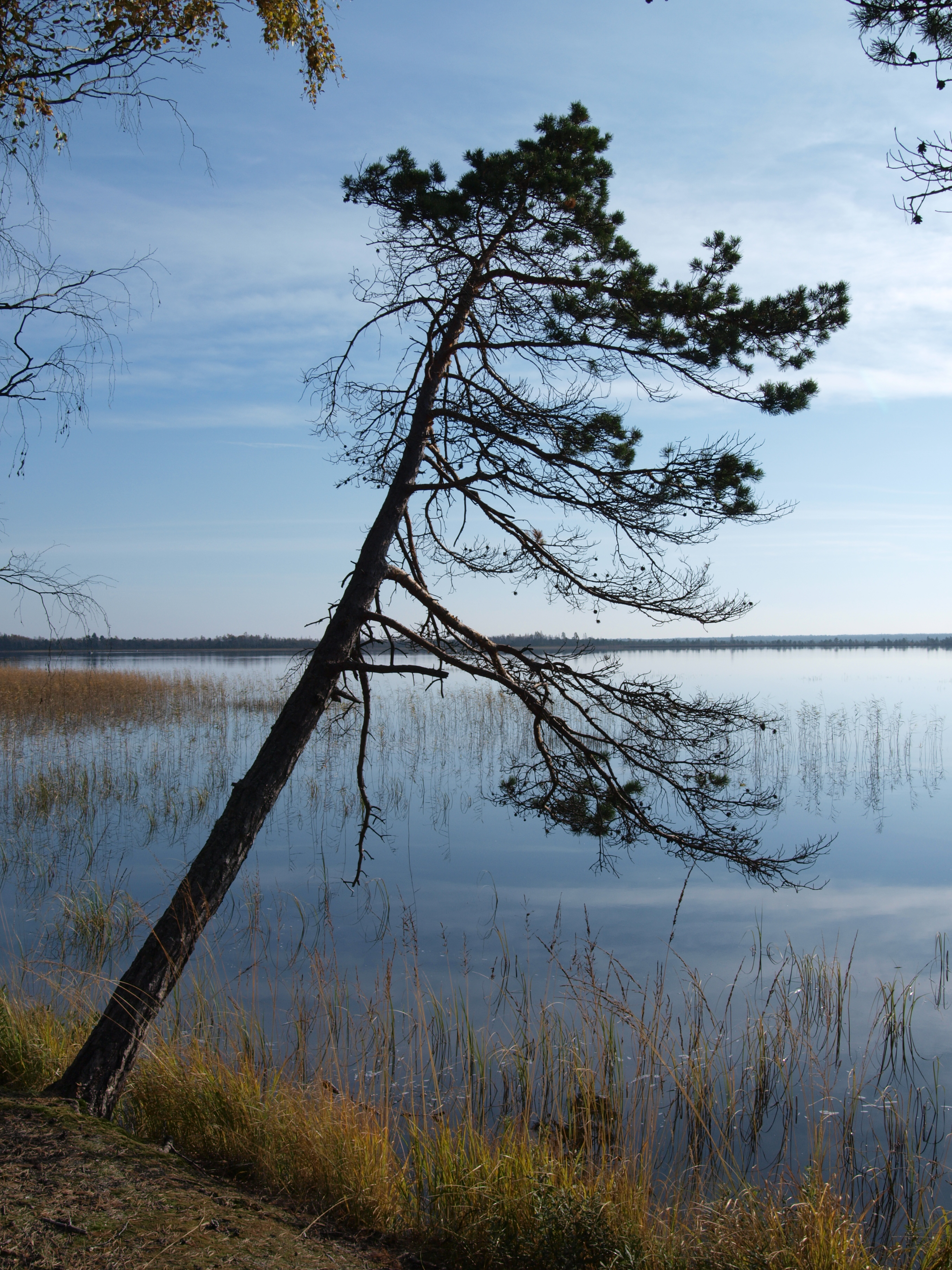 Pilt tehtud Tänavjärve loodekaldal Läänemaa Suursoo maastikukaitsealal.